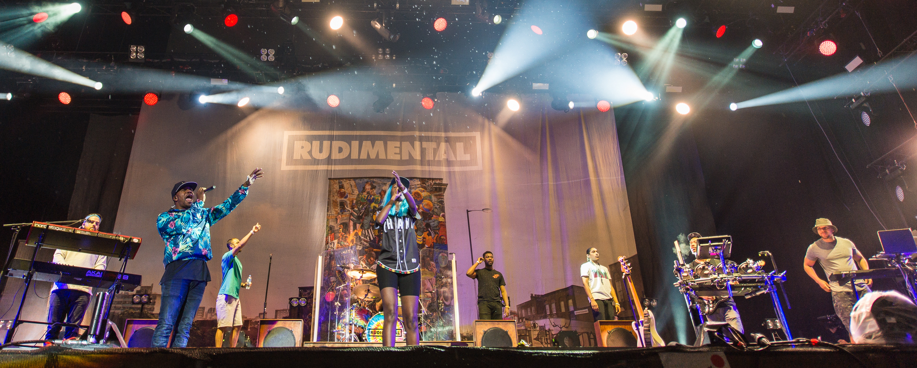 ARGO-Konzerte,Beck's Park Stage,Festival,Konzert,Livekonzert,Livemusik,Musik,RiP,Rock im Park 2016,Rudimental